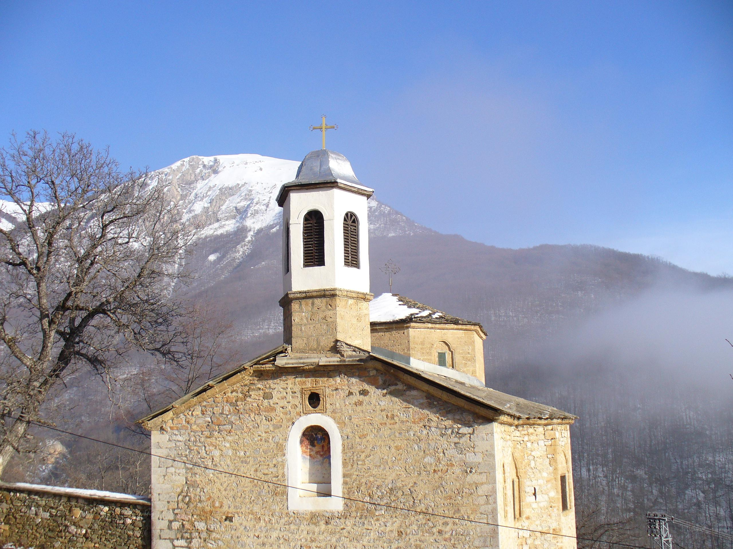 Църквата „Свети Илия“ в Селце, Дебърско, Република Македония.